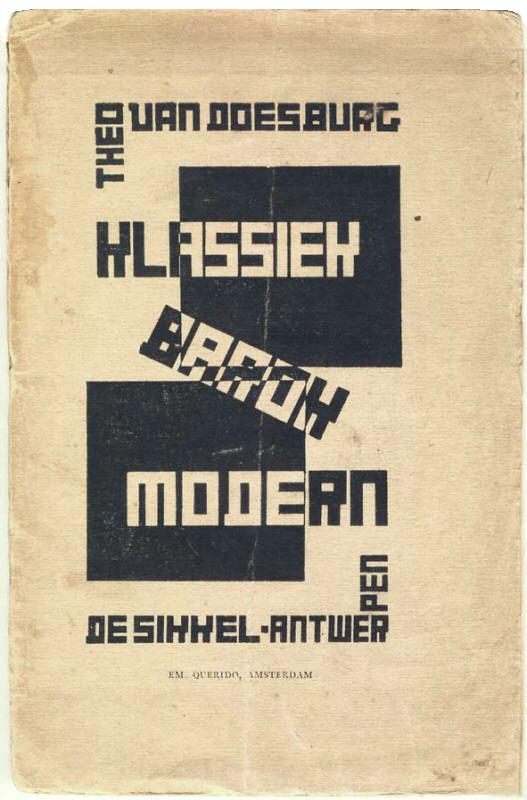 Cover for Klassiek-Barok-Modern.